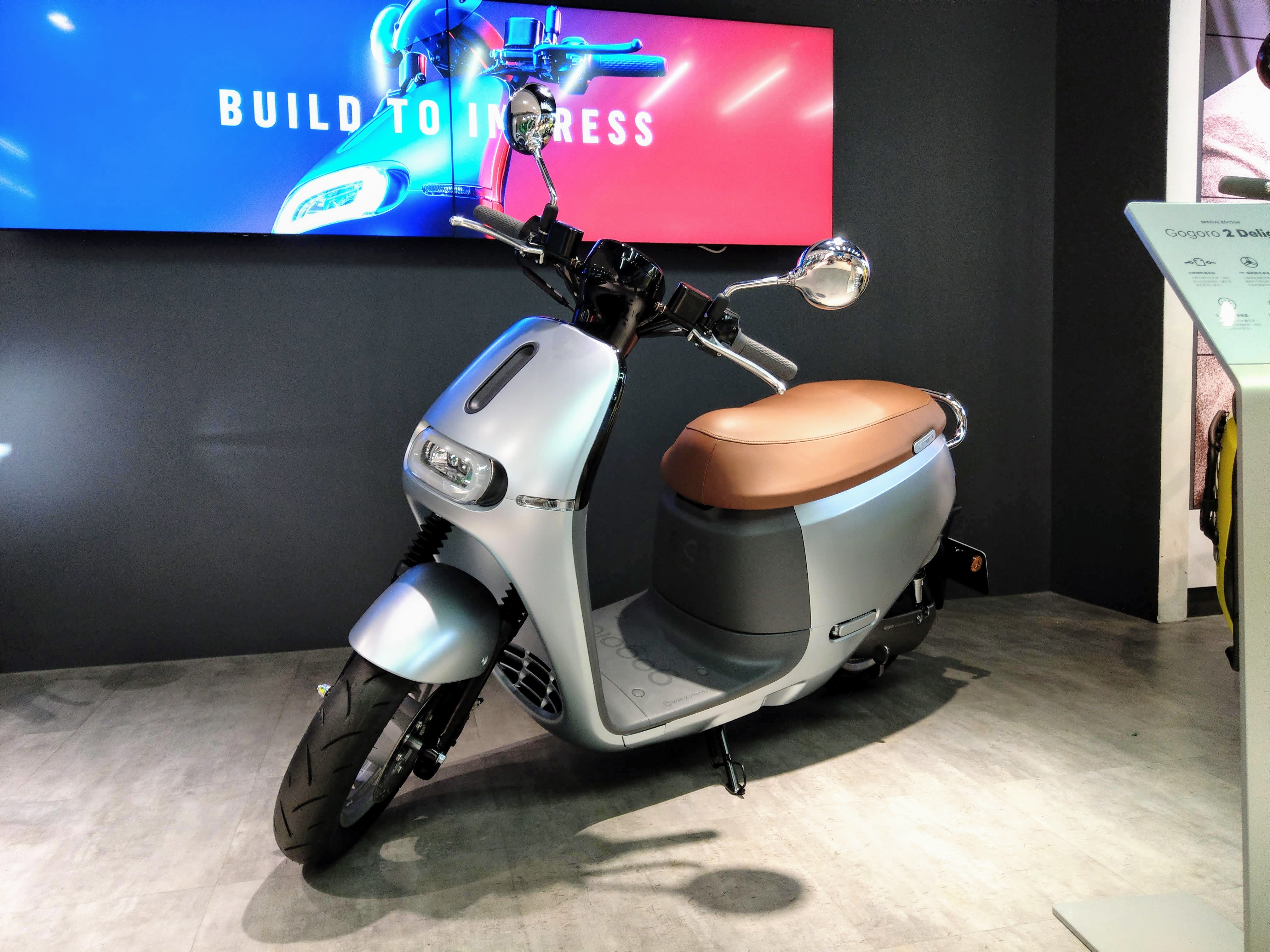 Gogoro 2 Series Delight 的全車外貌。